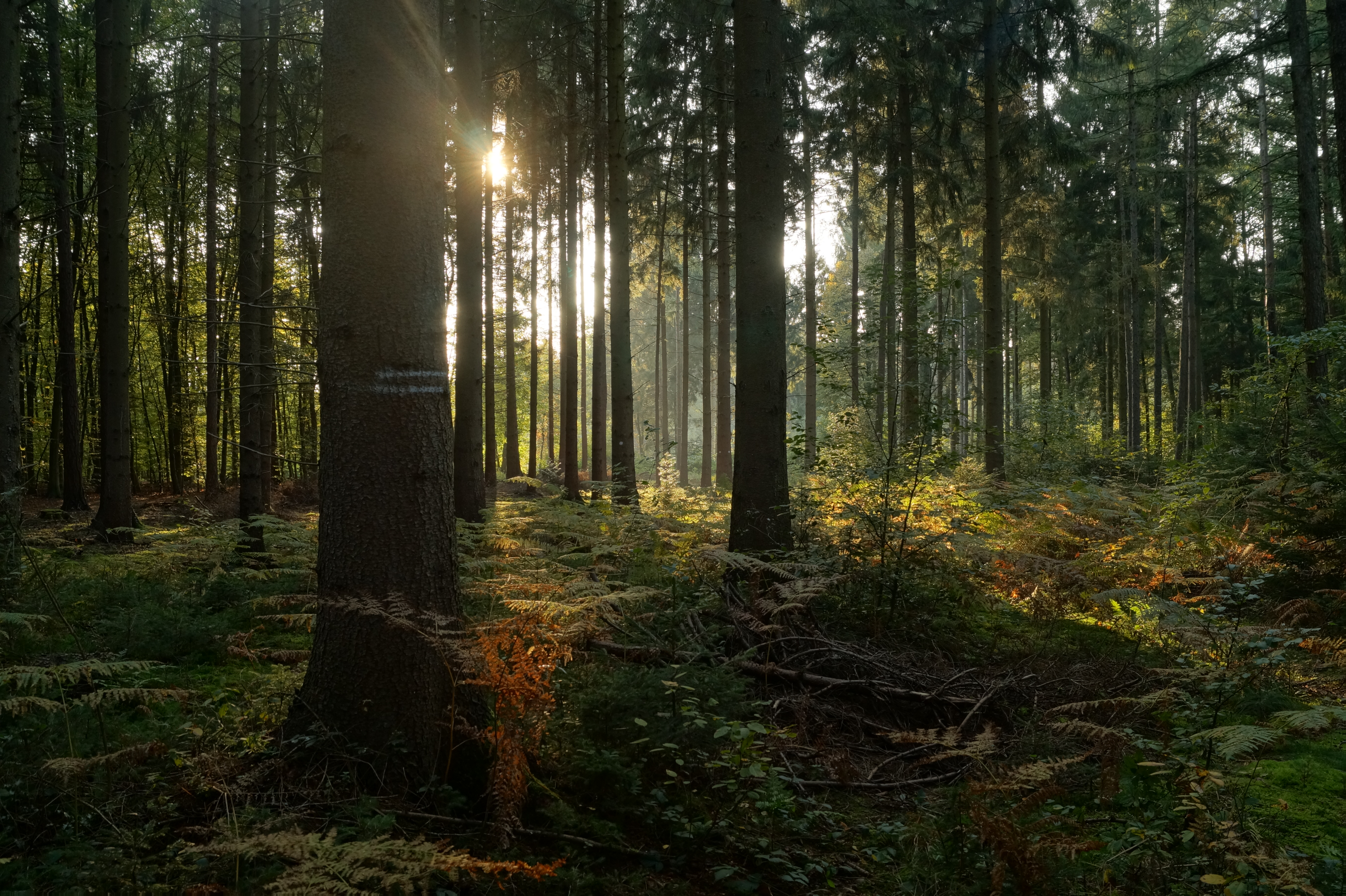 Naturnaher Fichtenforst im Waldgebiet Schluchter Heide; Naturschutzgebiet „Gierather Wald“ (NSG GL-057) in Bergisch Gladbach